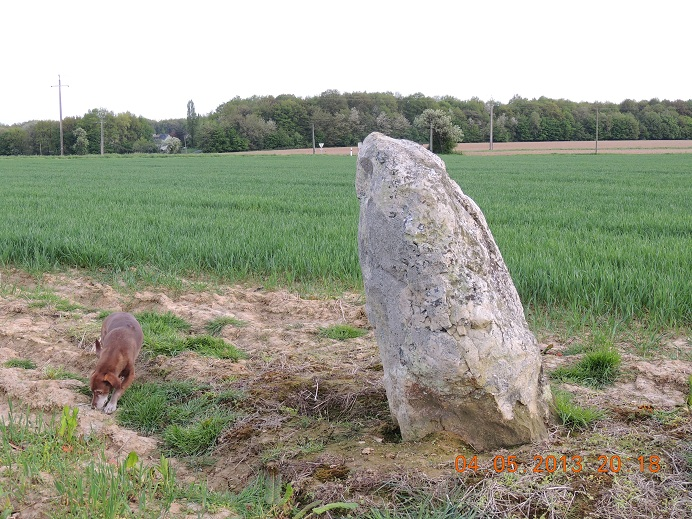 petit menhir de Nouzilly, un peu penché à gauche, au milieu d'un champs de jeunes pousses . Maisons, poteaux électriques et forêt à l 'horizon